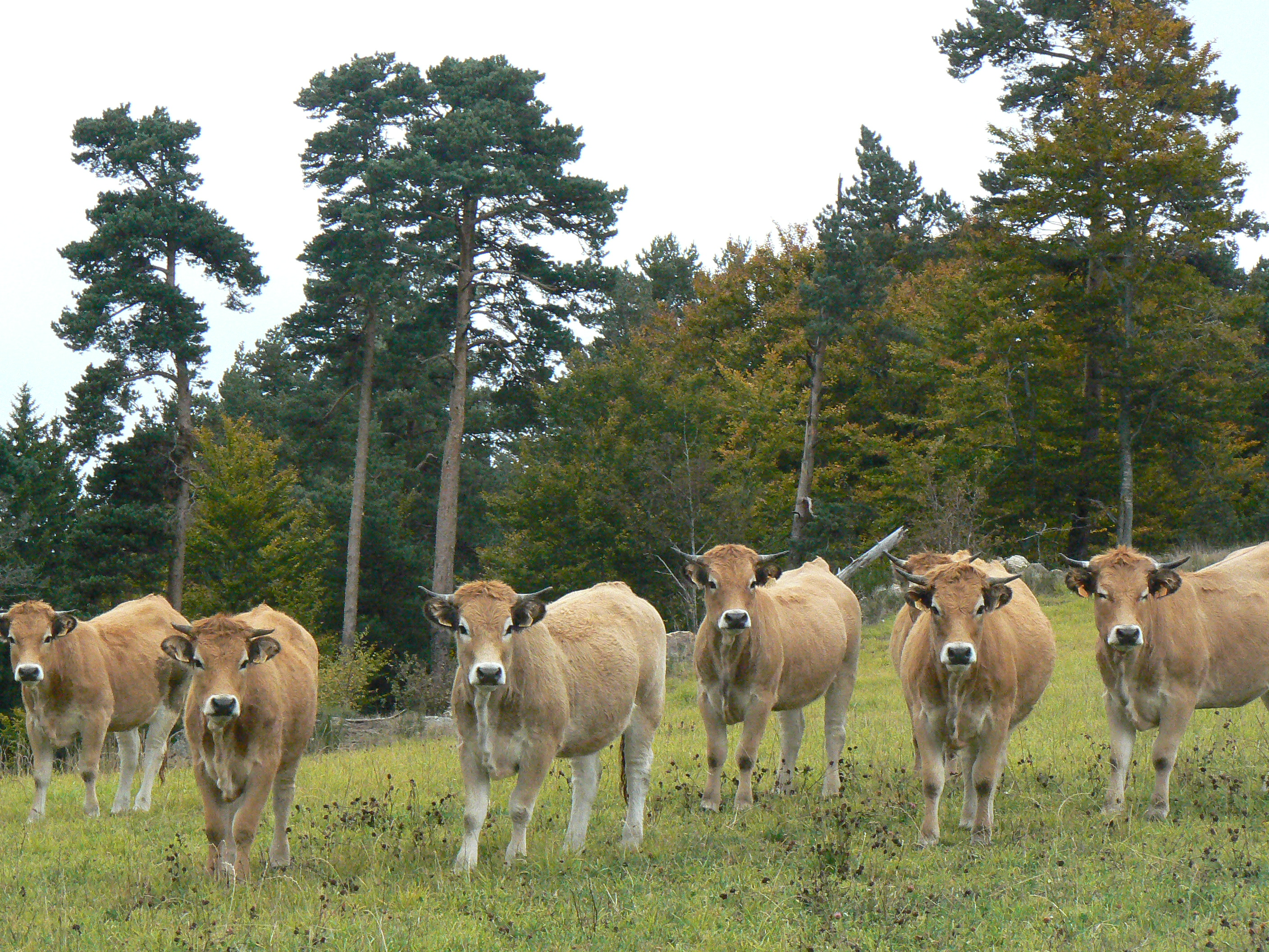 Troupeau de vaches Aubrac